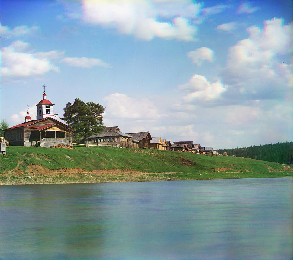 С. М. Прокудин-Горский. Общий вид пристани "Межевая Утка". [Река Чусовая.] 1912 год